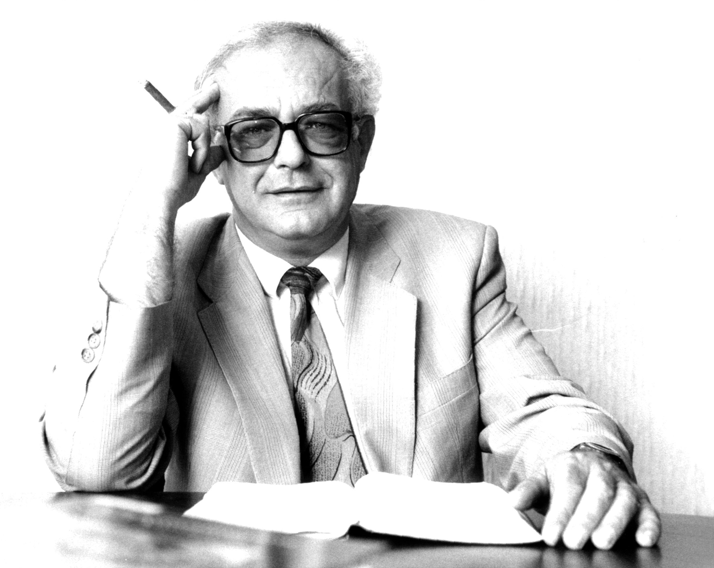 Porträt Johannes Dantine